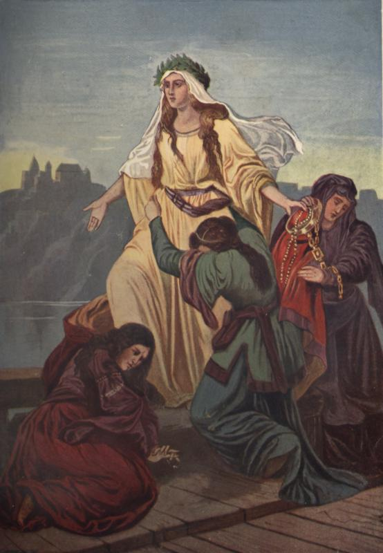 Ilustracja z książki Dzieje Polski wyd. II z 1909r. zatytułowana: "Wanda, córka Krakusa, rzuca się w nurty Wisły".